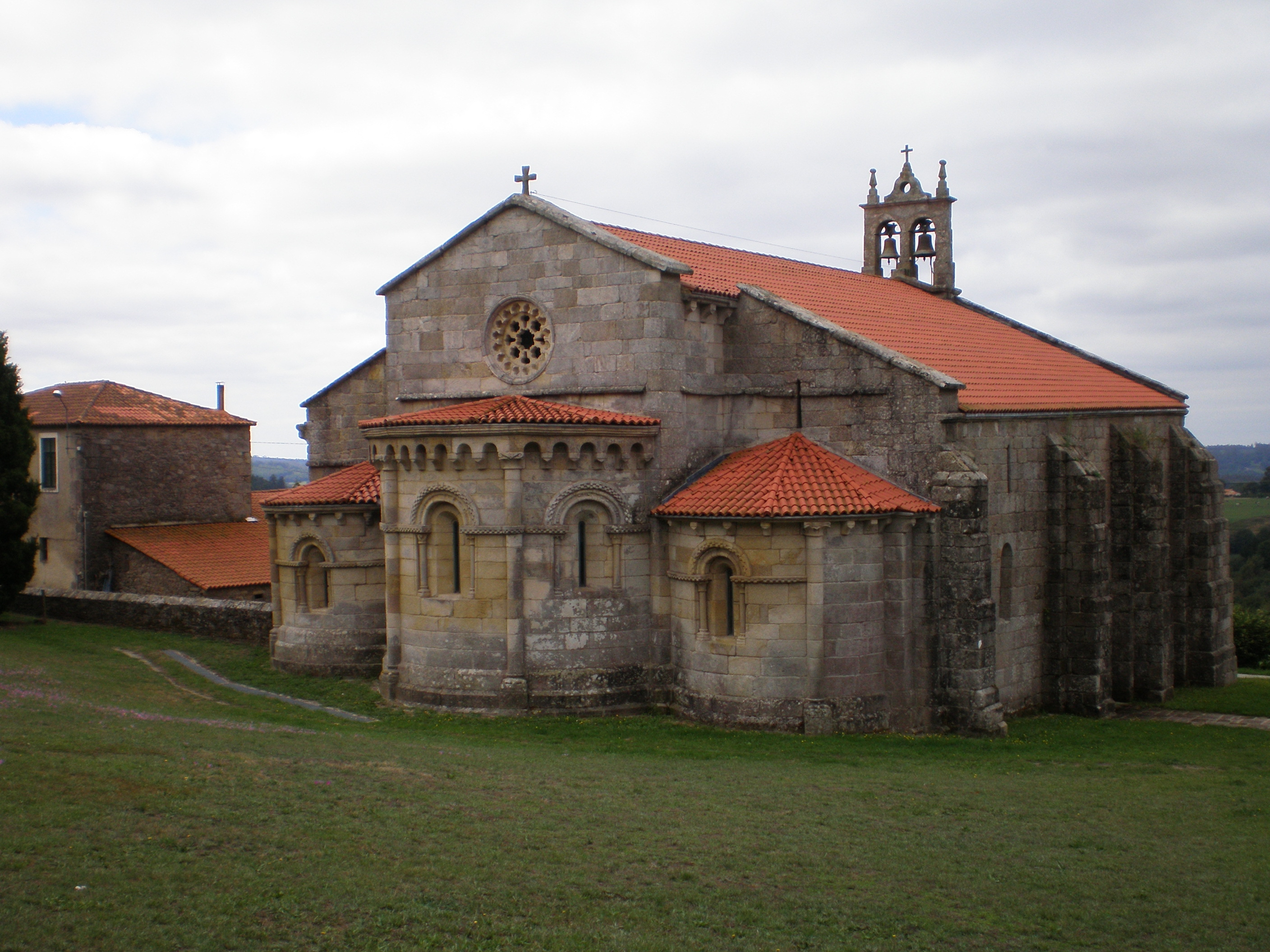 Iglesia románica del siglo XII, en el Ayuntamiento de Vilasantar (La Coruña). Está declarada como Bien de Interés Cultural desde el 3 de junio de 1931.